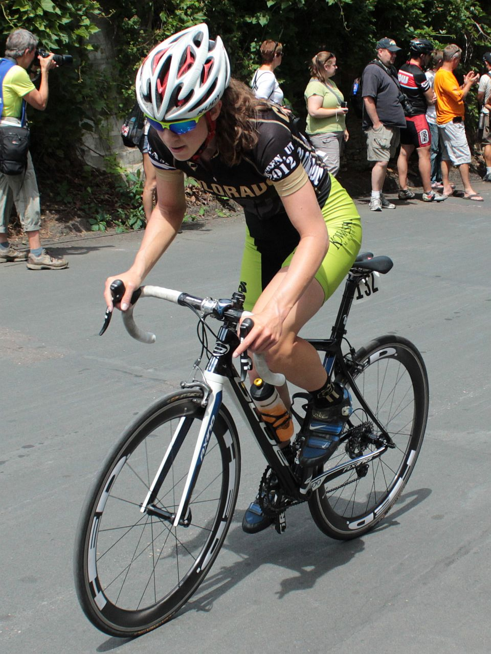 Heather Fischer, ciclista estatunidenca